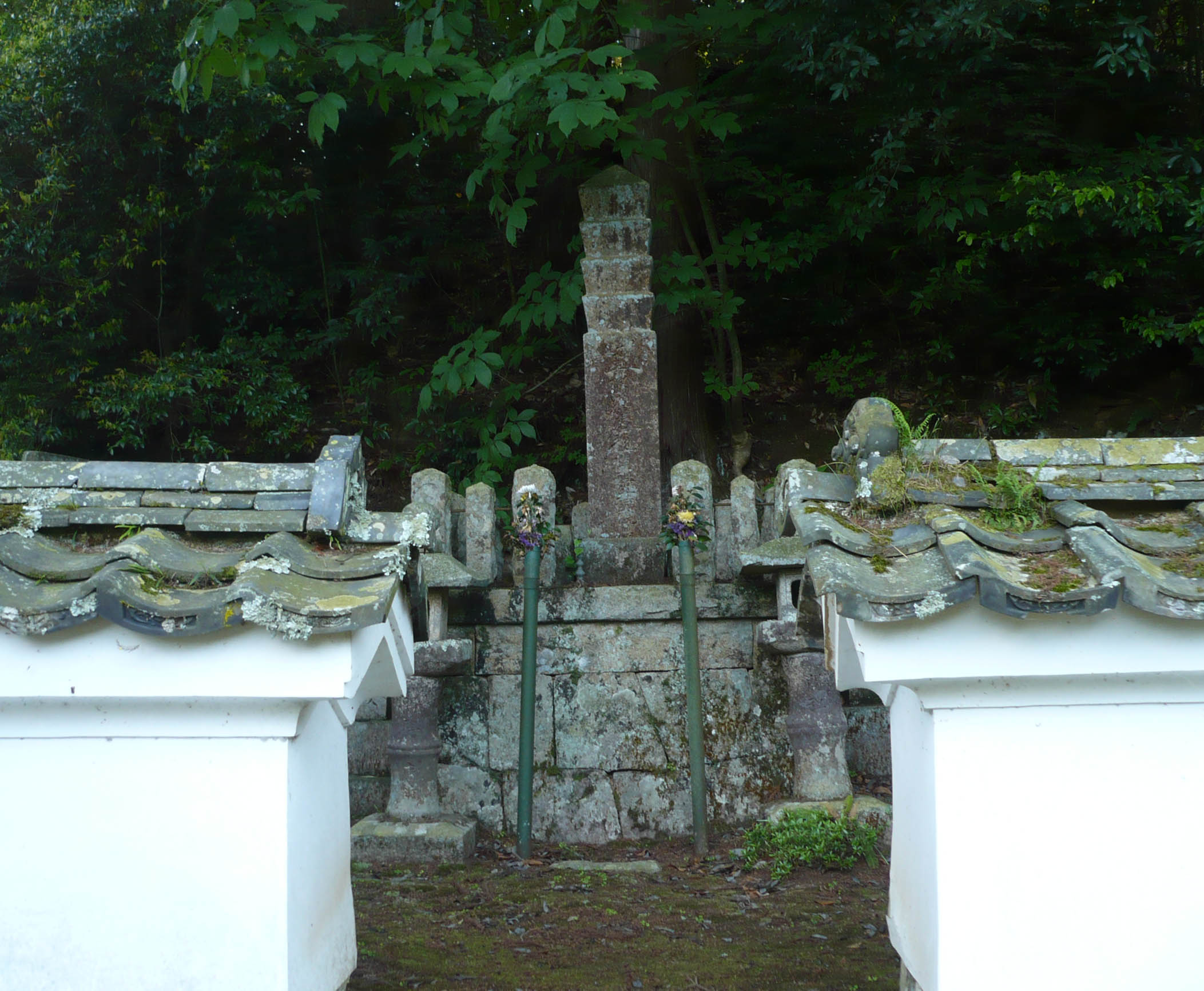 能勢家墓地